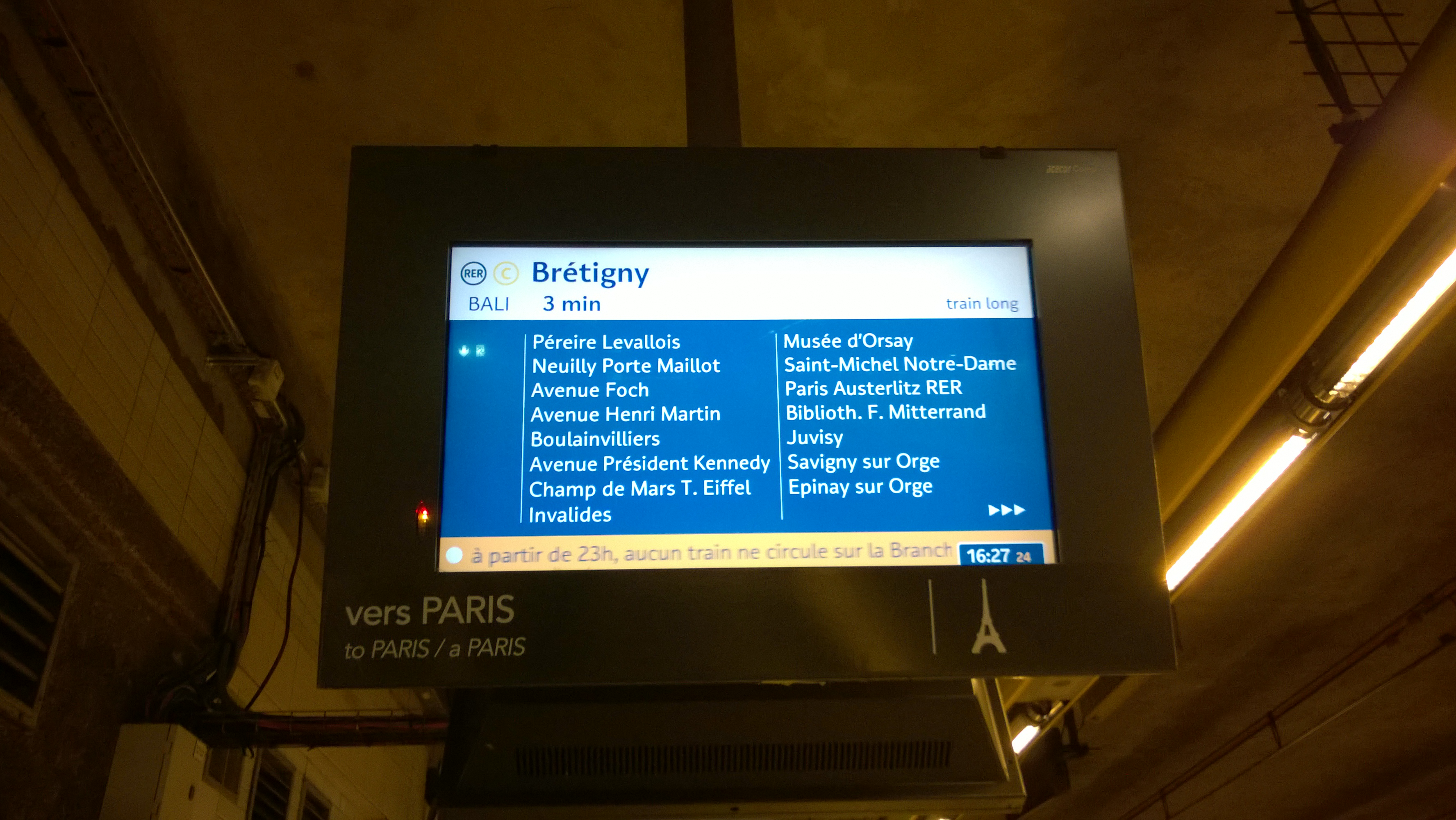 Sur la voie vers l'Essonne, un écran infogare-LCD.